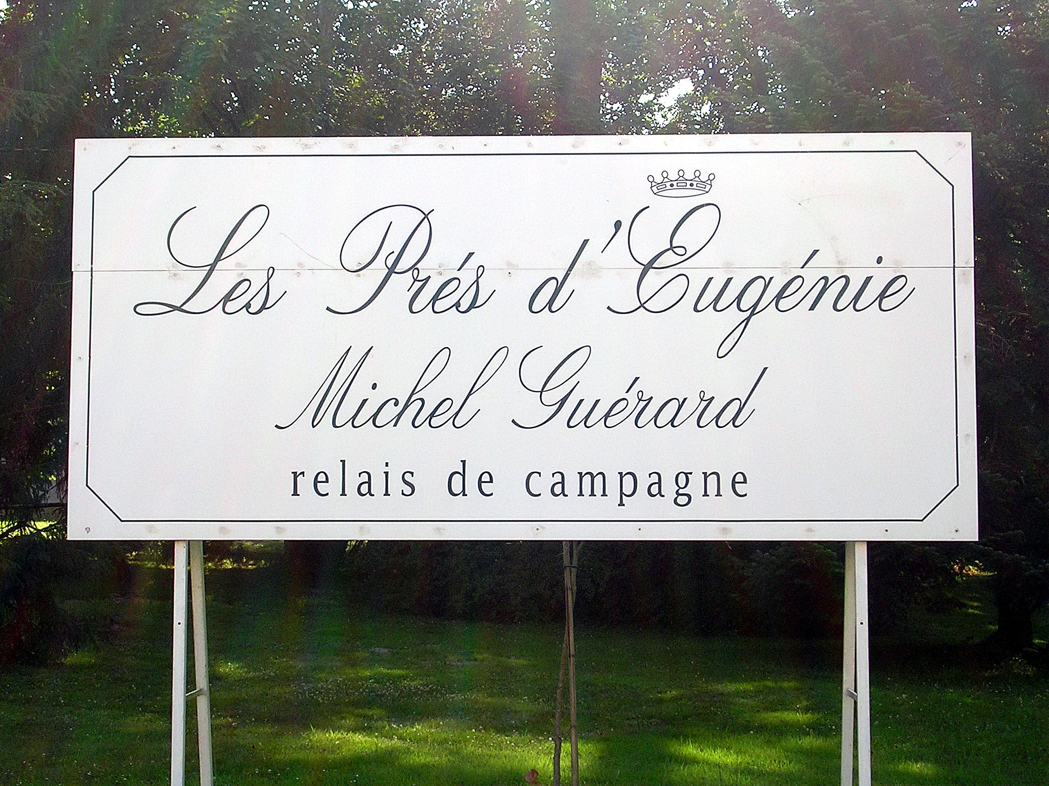 Les Prés d'Eugénie, centre thermal d'Eugénie-les-bains, dans les Landes (France). Photo prise par Jibi44 en juillet 2006.